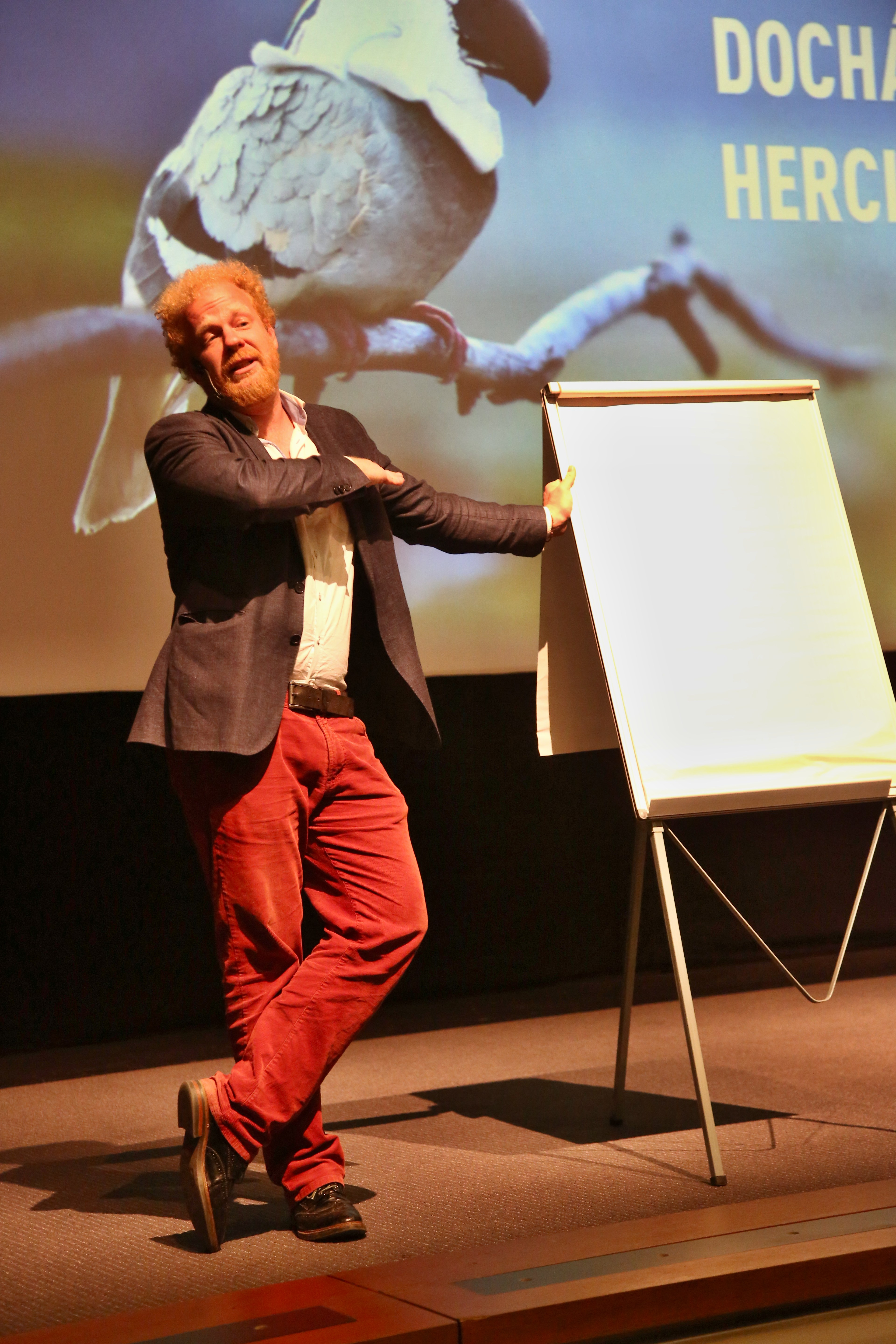 doorovodná akce